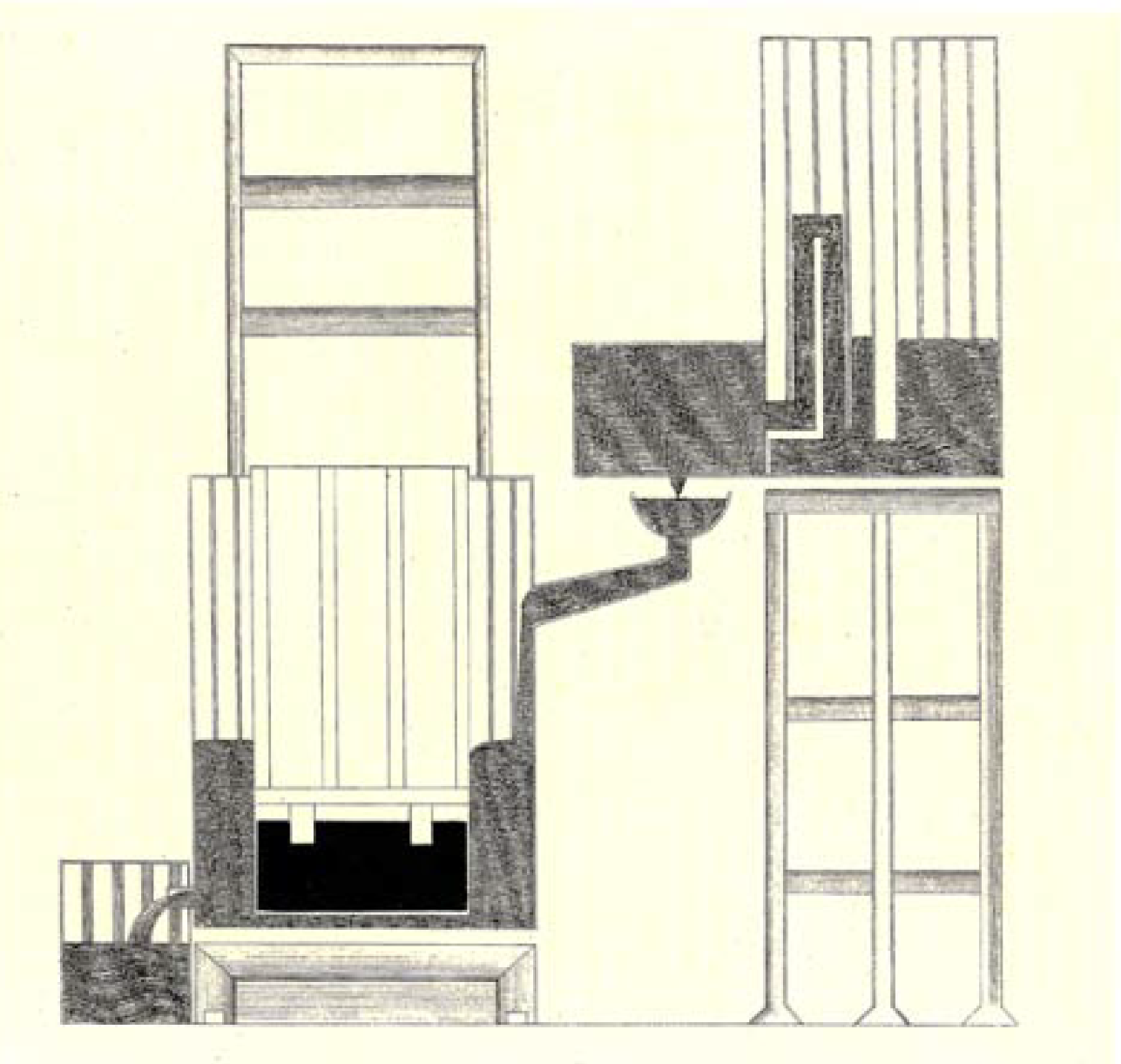 Schéma de principe du fonctionnement de l'horloge hydraulique.